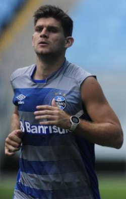 Walter Kannemann